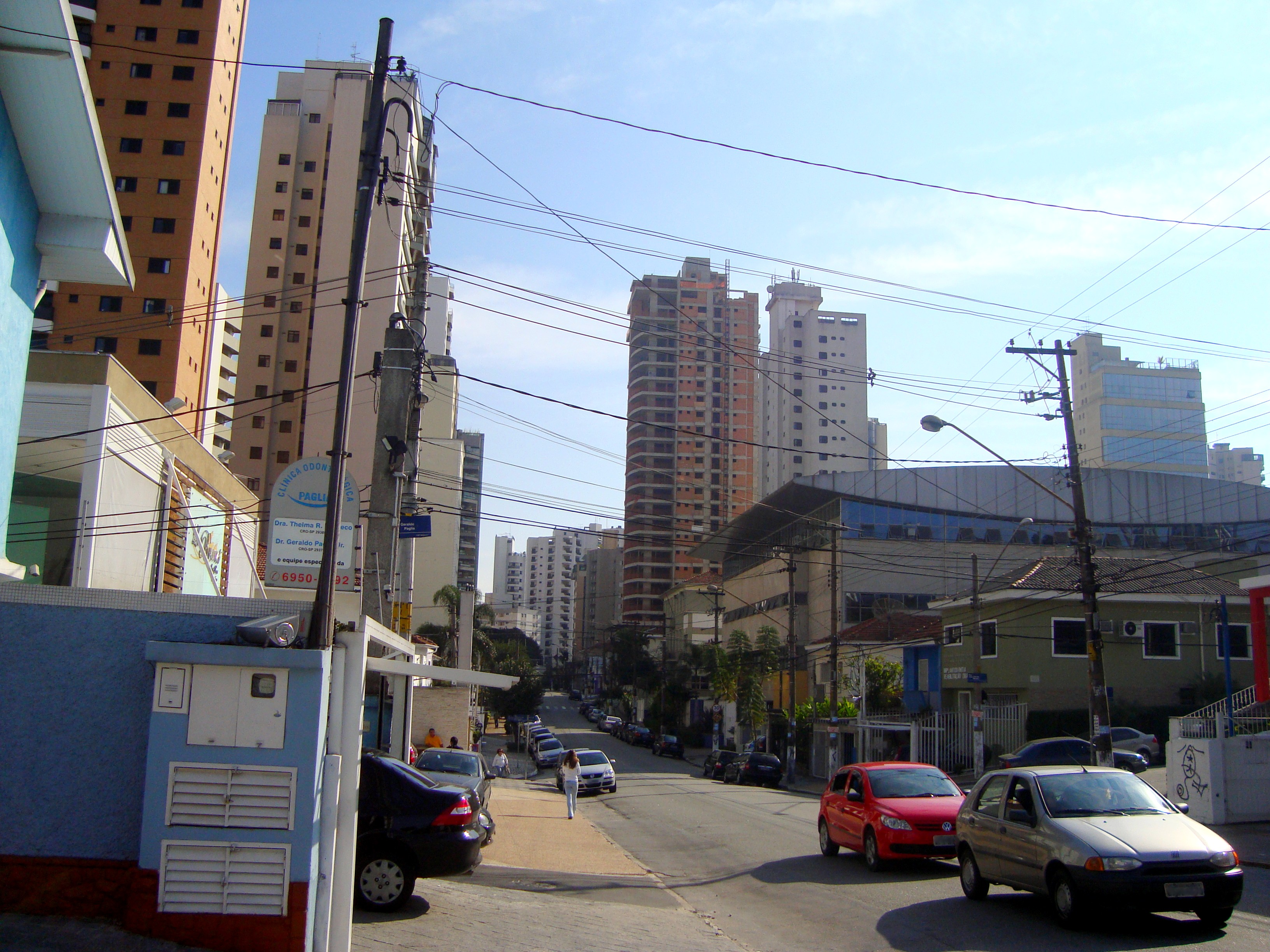 Foto da rua Pedro Doll em Santana São Paulo